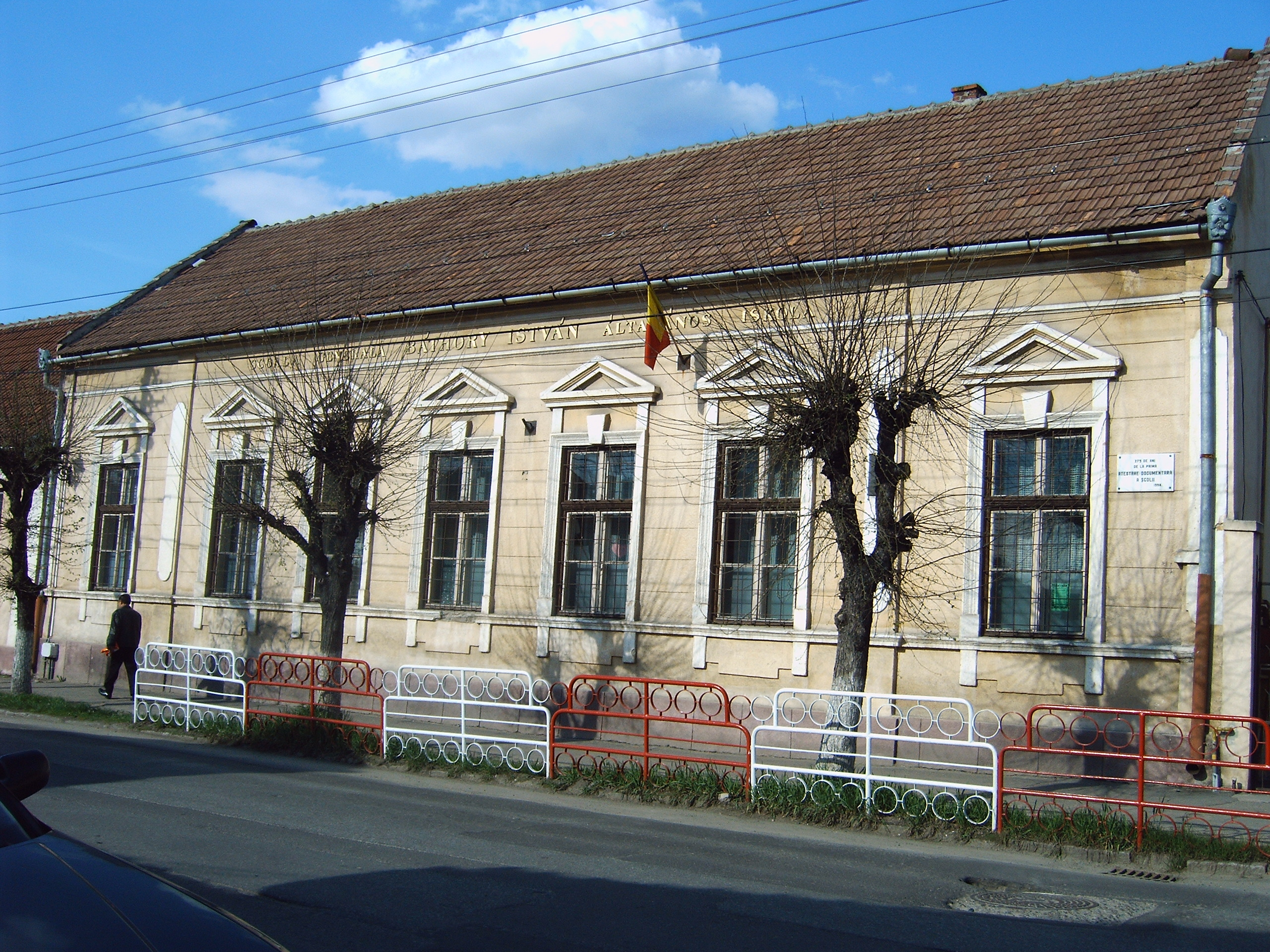 Volt Báthory István Általános Iskola épülete Medgyesen.